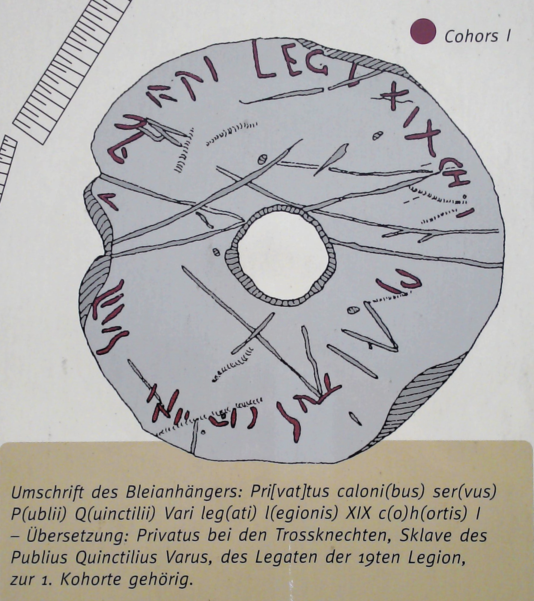 Römerlager Dangstetten (Landkreis Waldshut). Aufnahme von der öffentlichen Informationstafel: Bleianhänger mit Namensnennung des Publius Quinctilius Varus (19. Legion), 15 — 9. v. Chr.